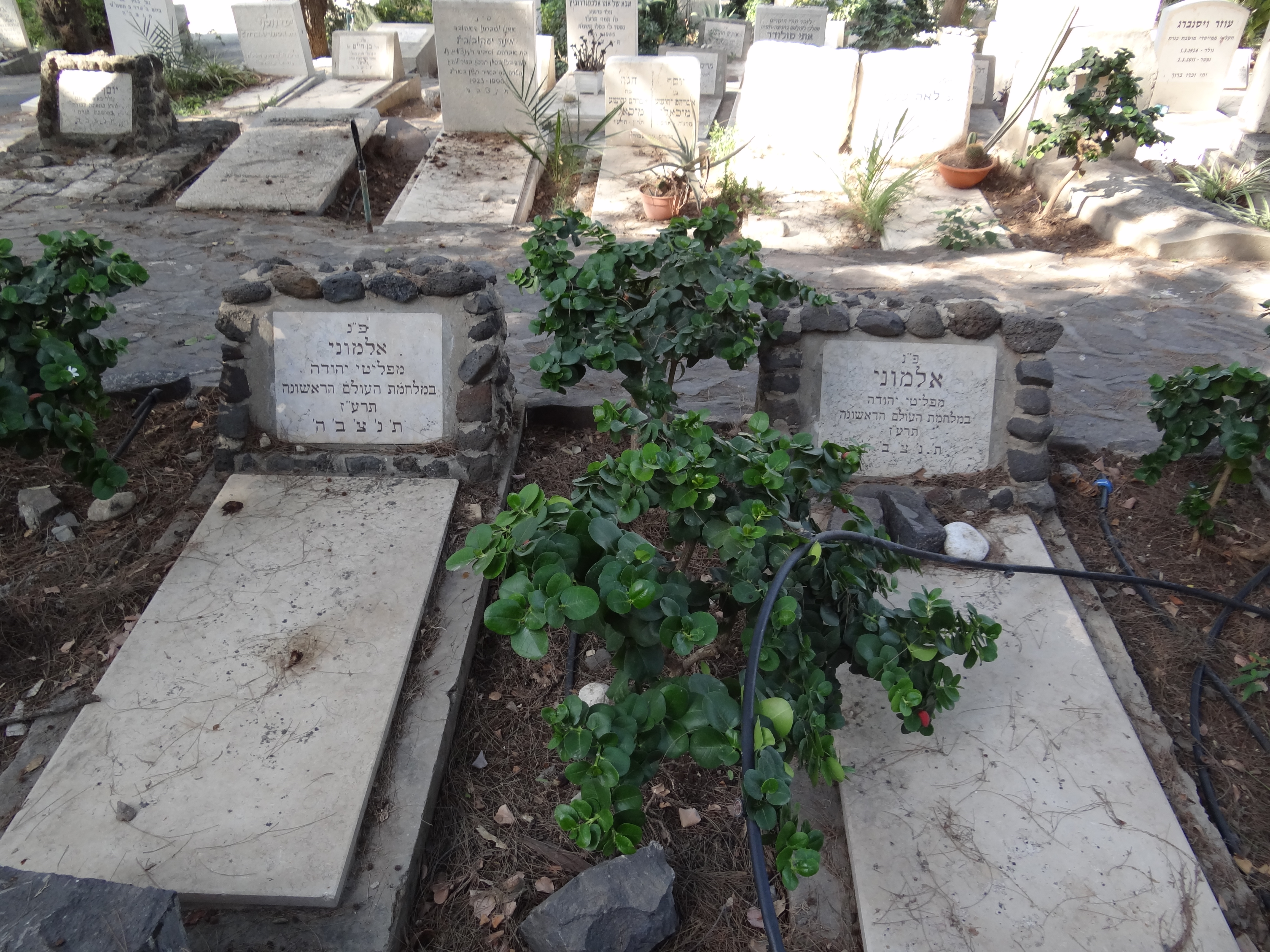 Kinnert Cemetery בית הקברות כנרת הוא בית קברות השוכן לחוף הכנרת, בקרבת המושבה כנרת וקבוצת כנרת.